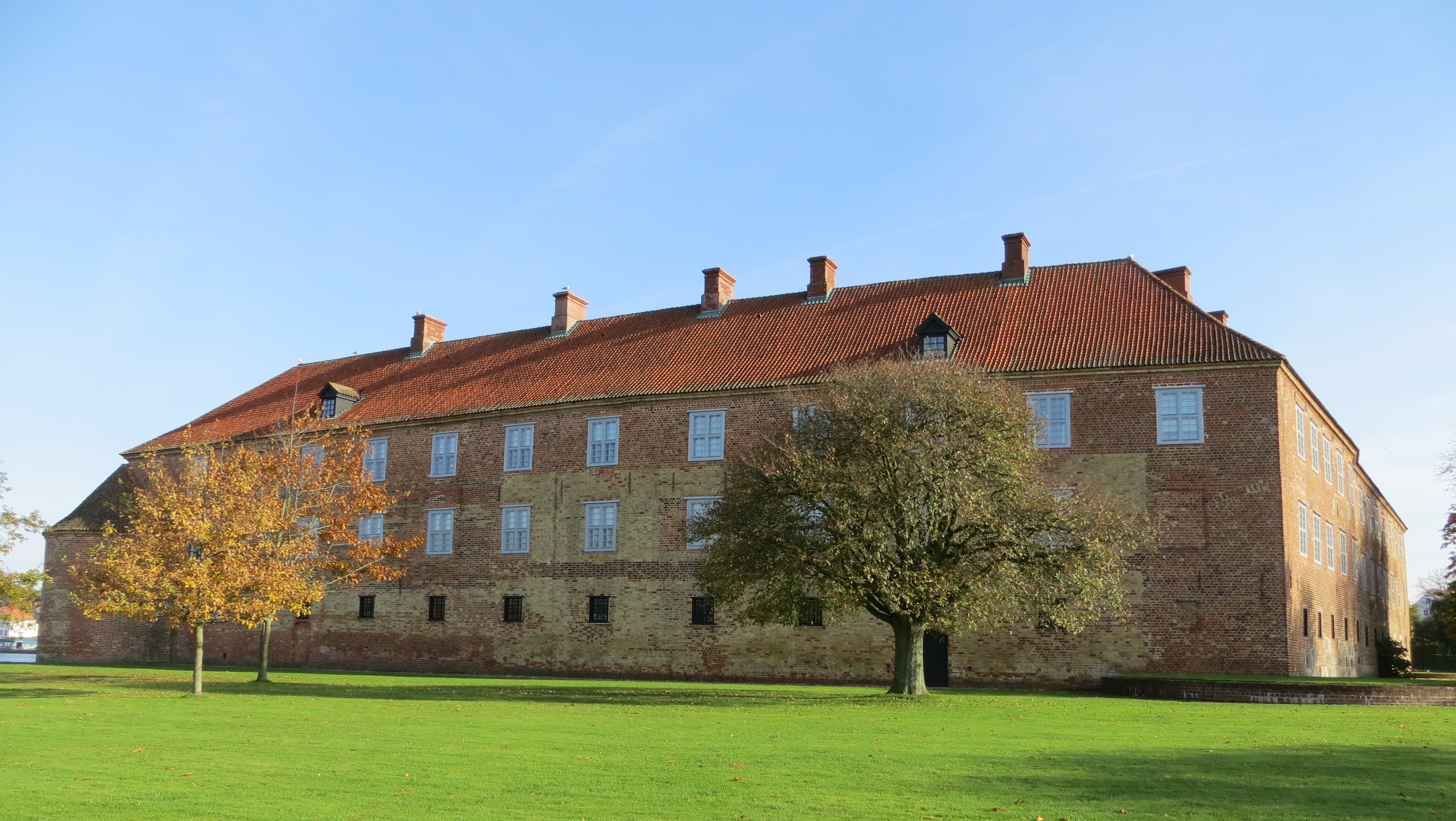 Schloss Sonderburg (2013), Bild 05